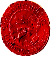 Stavitelé železnic, hutní výroba a těžba uhlí v Evropě v 19. století; známý je Kleinův palác v Brně